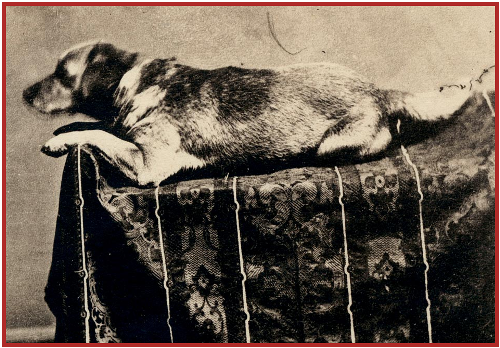 Фотография собаки Авраама Линкольна по кличке Фидо (Fido), Снимок сделан в 1861 году. Хранится в Библиотеке и Музее Авраама Линкольна.